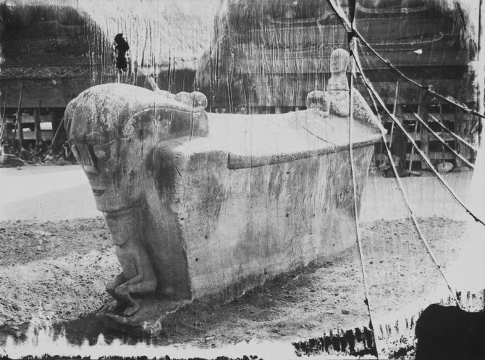 foto. Een stenen sarcofaag in een Toba Batak dorp